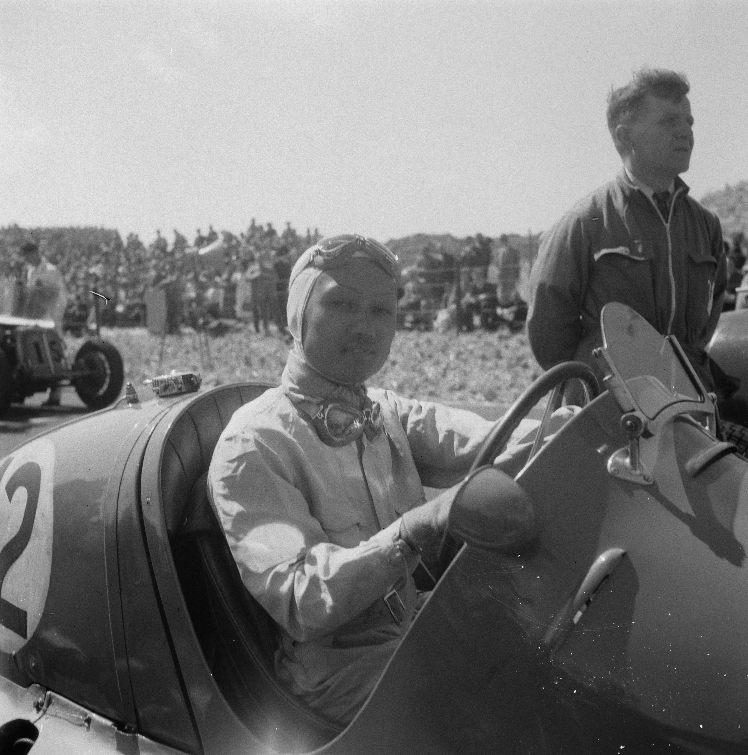 Collectie / Archief : Fotocollectie Anefo Reportage / Serie : [ onbekend ] Beschrijving : Autoraces te Zandvoort. Prins Bira van Siam in zijn Maserati voor de start van de eerste internationale wedstrijd op Zandvoort. Hij zal later de wedstrijd winnen Datum : 7 augustus 1948 Locatie : Noord-Holland, Zandvoort Trefwoorden : auto's, sport Persoonsnaam : Bira prins, Maserati Fotograaf : Noske, J.D. / Anefo Auteursrechthebbende : Nationaal Archief Materiaalsoort : Negatief (zwart/wit) Nummer archiefinventaris : bekijk toegang 2.24.01.03 Bestanddeelnummer : 902-9011